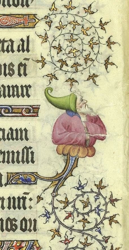 Grandes Heures de Jean de Berry Fol. 121v - grotesque